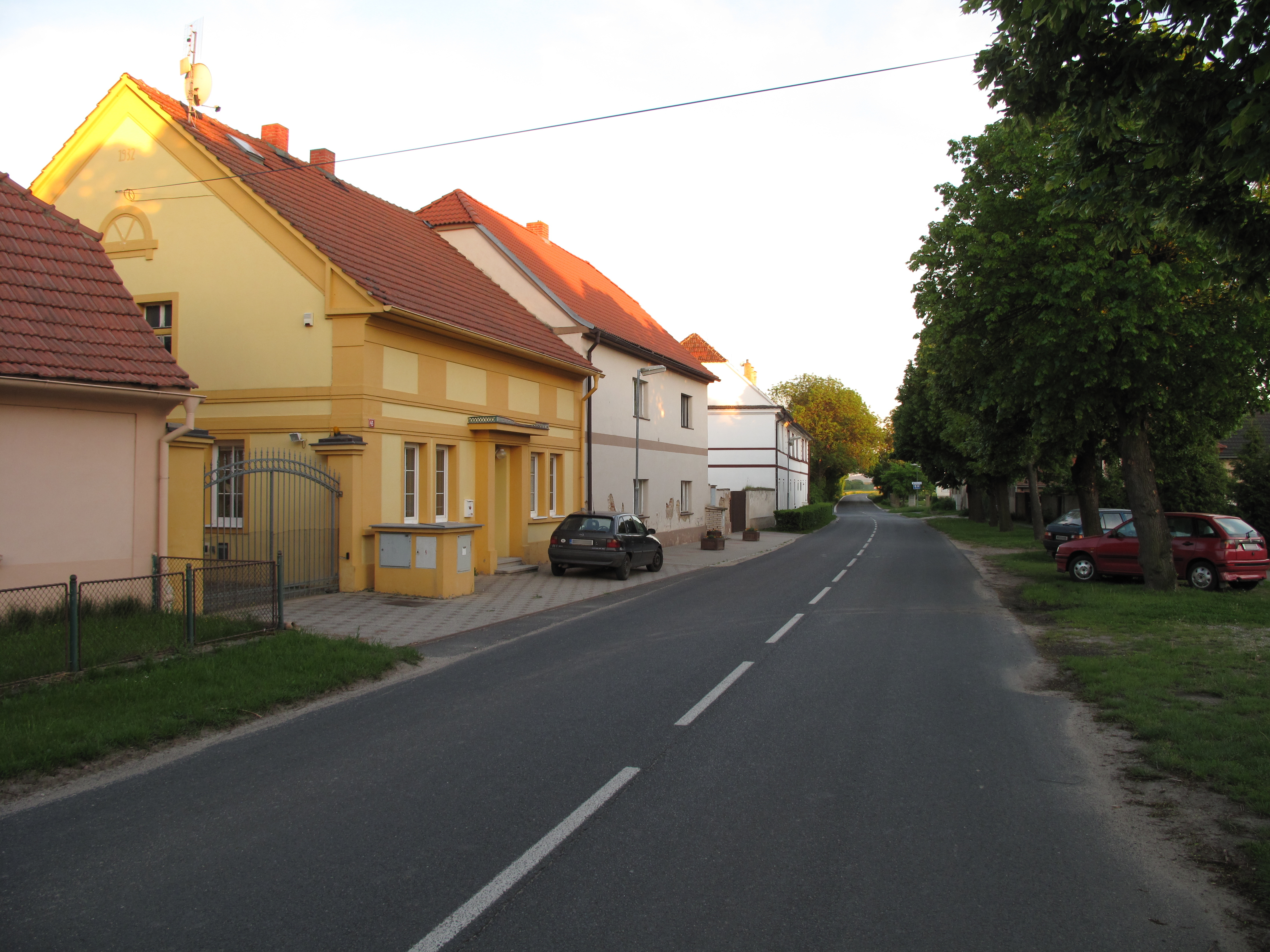 Domy v Nučničkách. Okres Litoměřice, Česká republika.